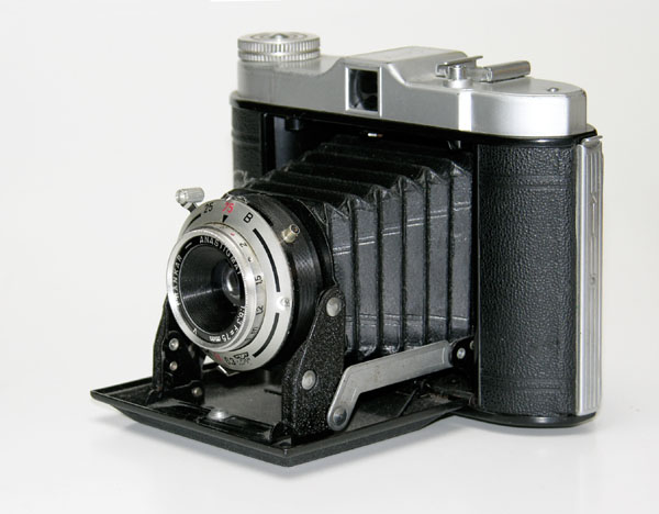 Public Domain - selbst fotografiert; Diese hier abgebildete Franka Kamera ist keine Fachkamera, sondern eine starre 6x6 Rollfilm Falt-Kamera. Eine Fachkamera lässt sich beliebig verstellen, während bei dieser Kamera (im Idealfall) immer die Filmebene parallel zur Objektiv-Ebene steht.